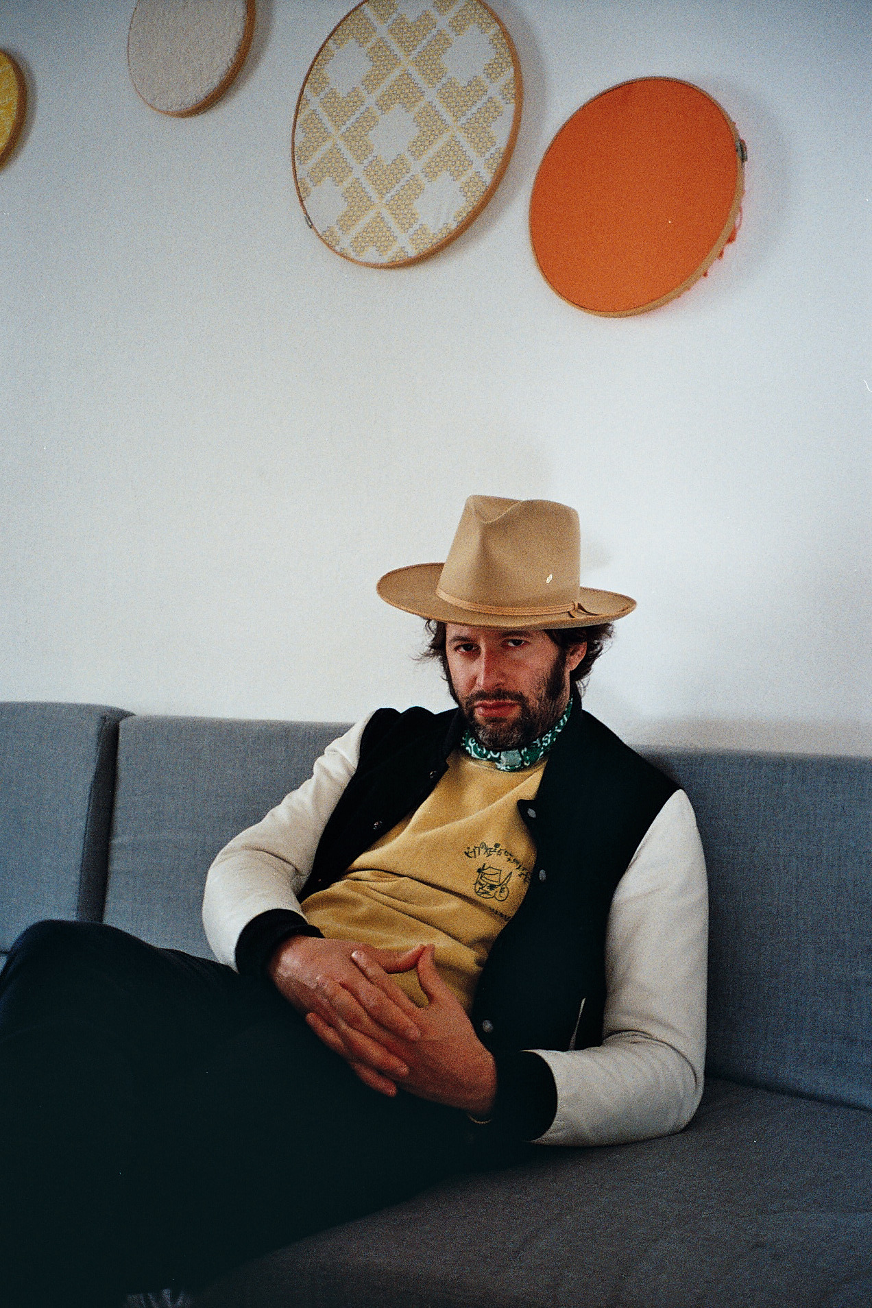 Adan Jodorowsky, 2017. Fotografía por Alejandro Arras.